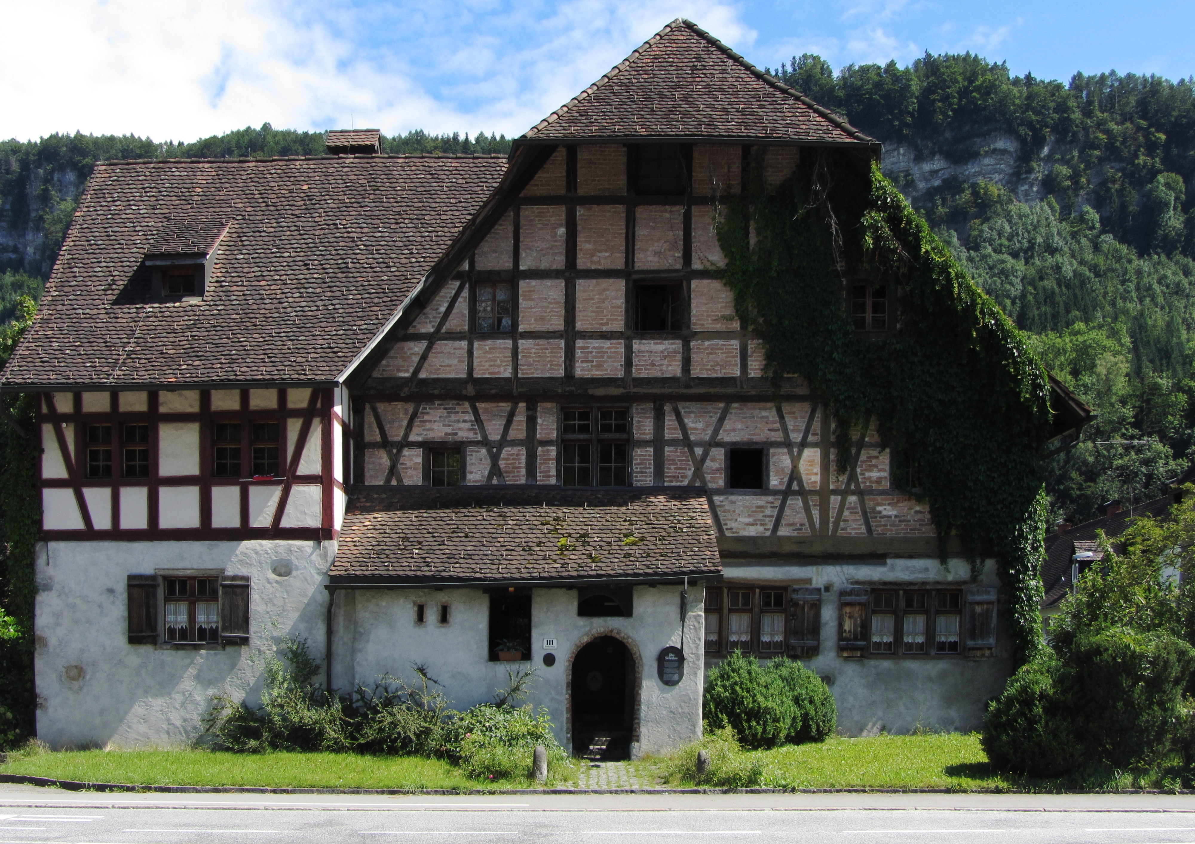 Siechenhaus in Feldkirch, Vorarlberg.